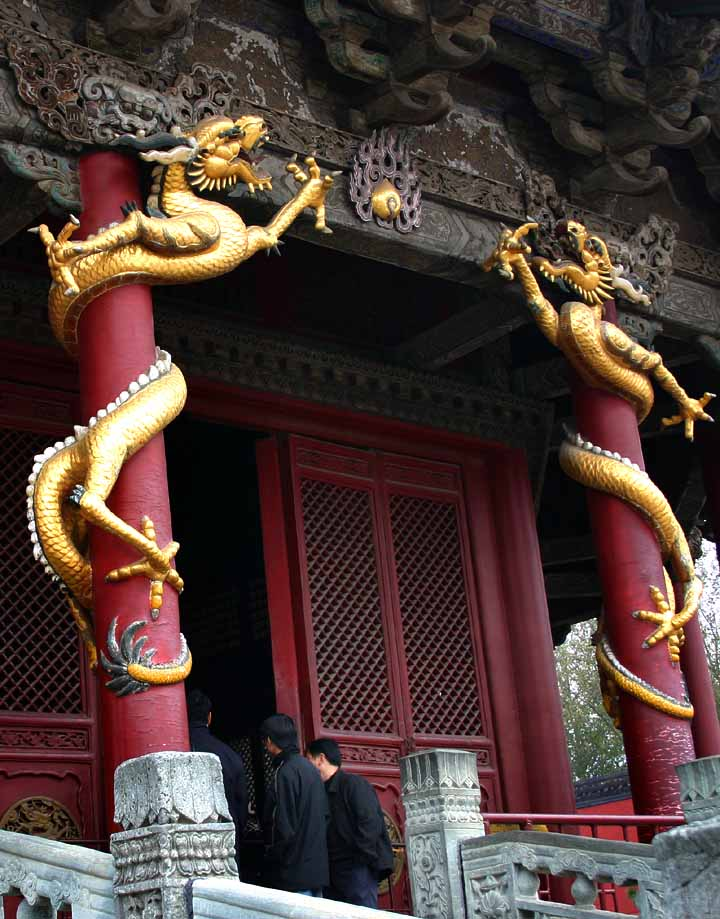 China